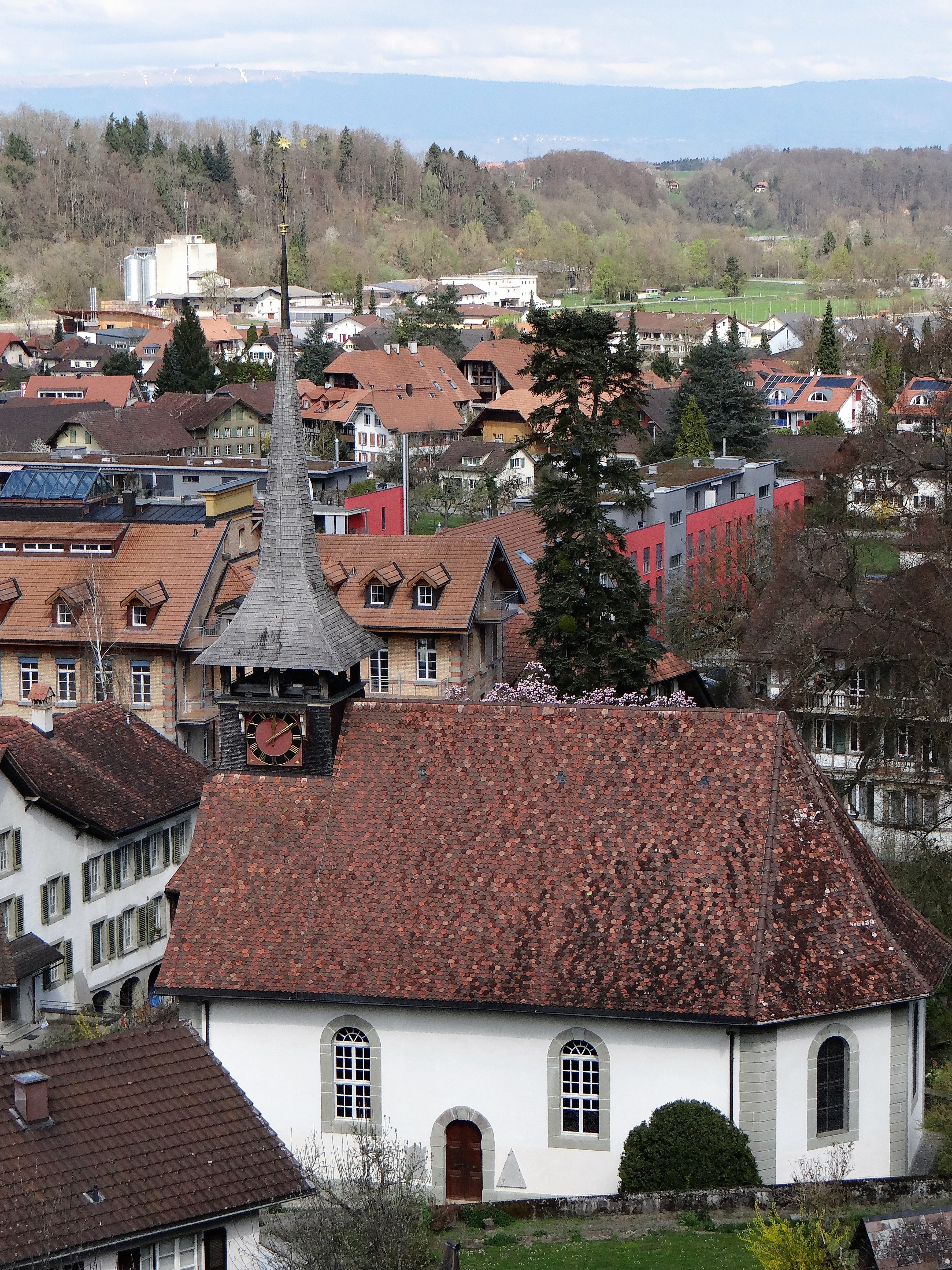 Laupen Kirche